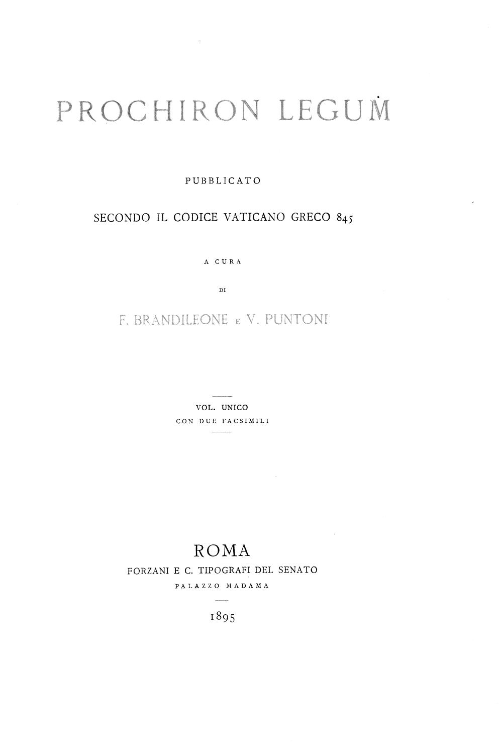 Frontespizio